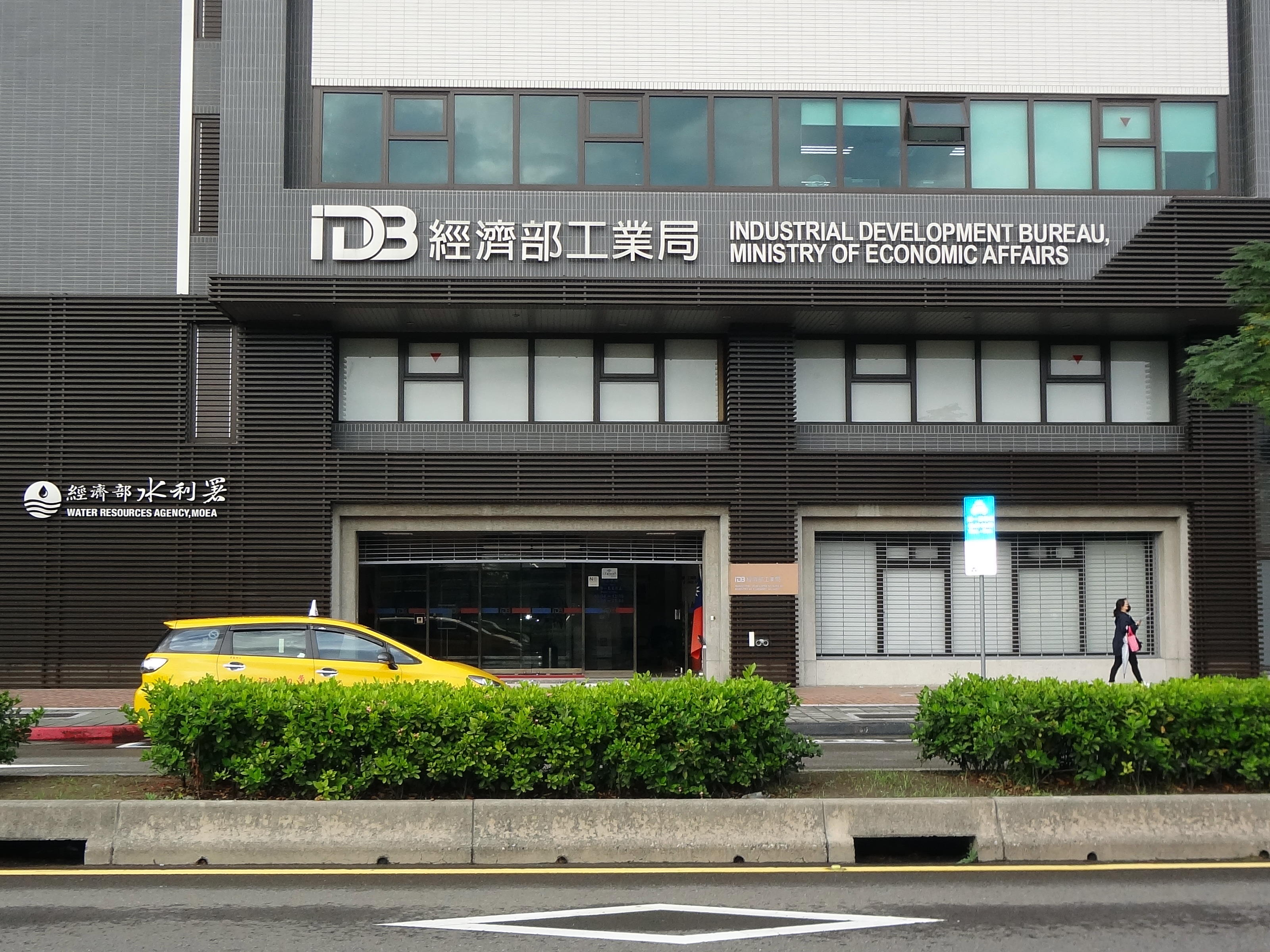 中華民國經濟部工業局總局、經濟部水利署臺北辦公區，位於臺北市大安區信義路三段41之3號（信義大樓）。